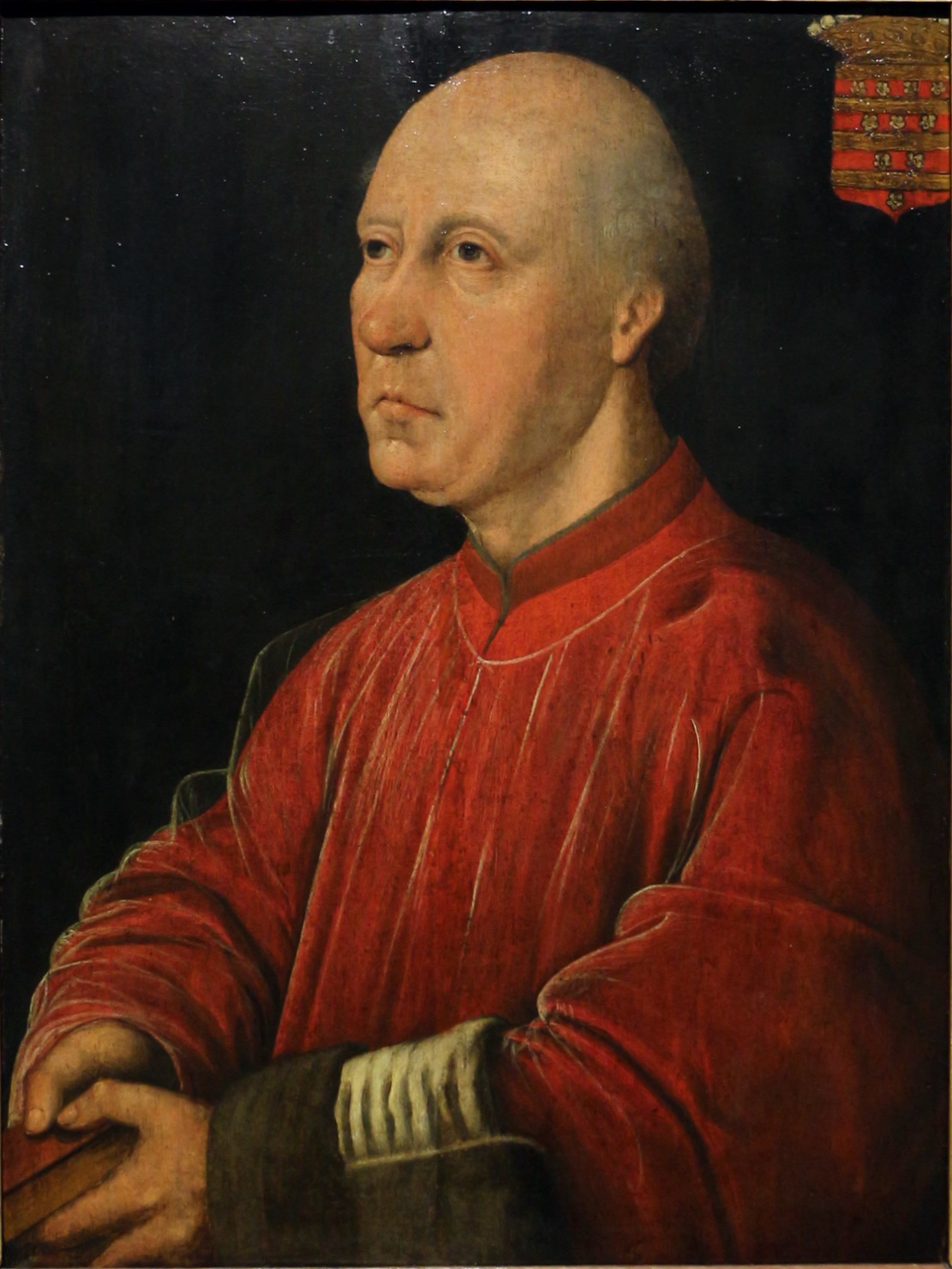 Portret van Evert Zoudenbalch (ca. 1425-1503), proost van het kapittel van Sint Servaas te Maastricht, kanunnik, vice-deken en thesaurier van het kapittel van de Dom te Utrecht, stichter van het Sint Elisabethsgasthuis te Utrecht.